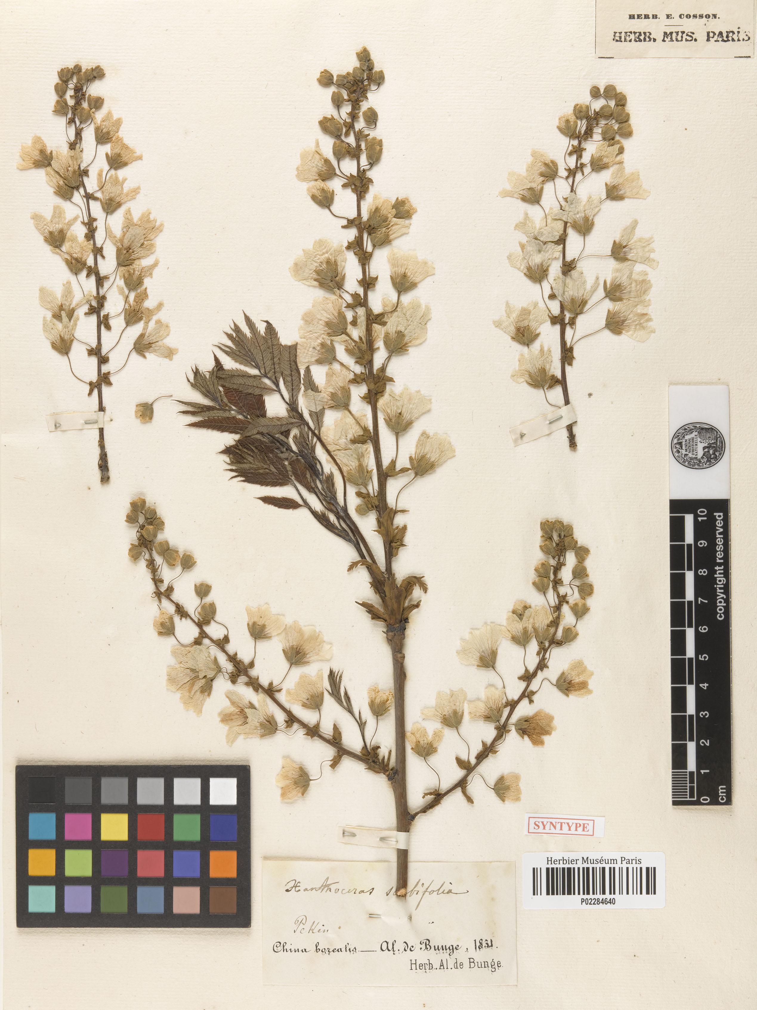 Inflorescences